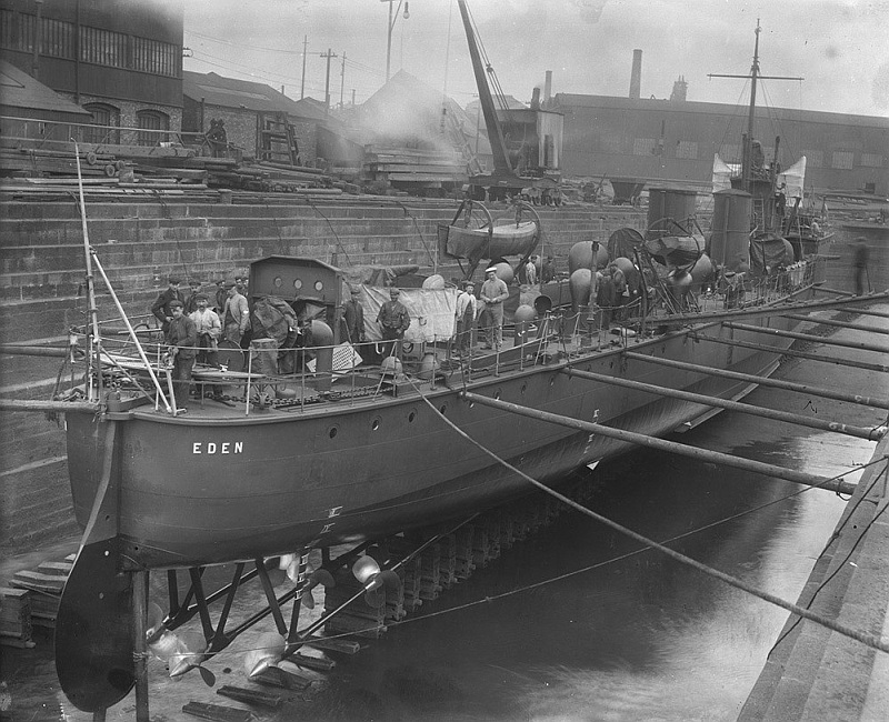 Heckansicht und Propeller der HMS Eden